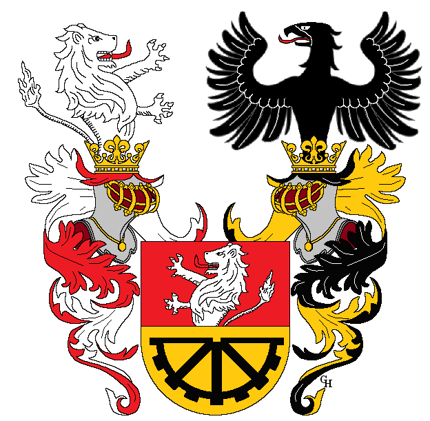 Wappen des Erfinders und Unternehmers Ferdinand Mannlicher (1848–1904), verliehen anlässlich seiner Erhebung in den österreichischen Ritterstand 1892. Zeichnung von Gerd Hruška ( Für weitere Informationen zu dieser Standeserhebung siehe (